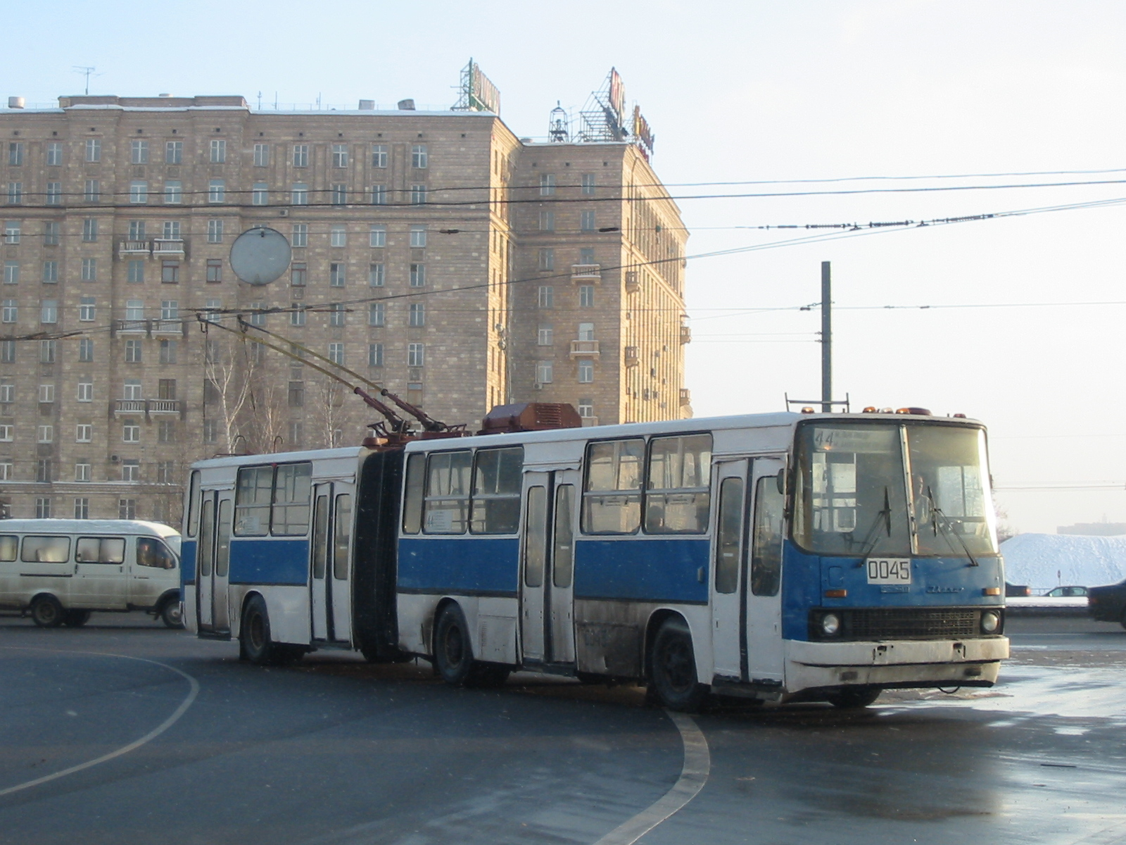 Mosgortrans SVARZ-Ikarus trolleybus 0045. Rare type in Ikarus-283 long body. Rebuild from diesel bus in 1991 СВАРЗ-Икарус в кузове Икарус-283. Москва, метро Парк Победы.